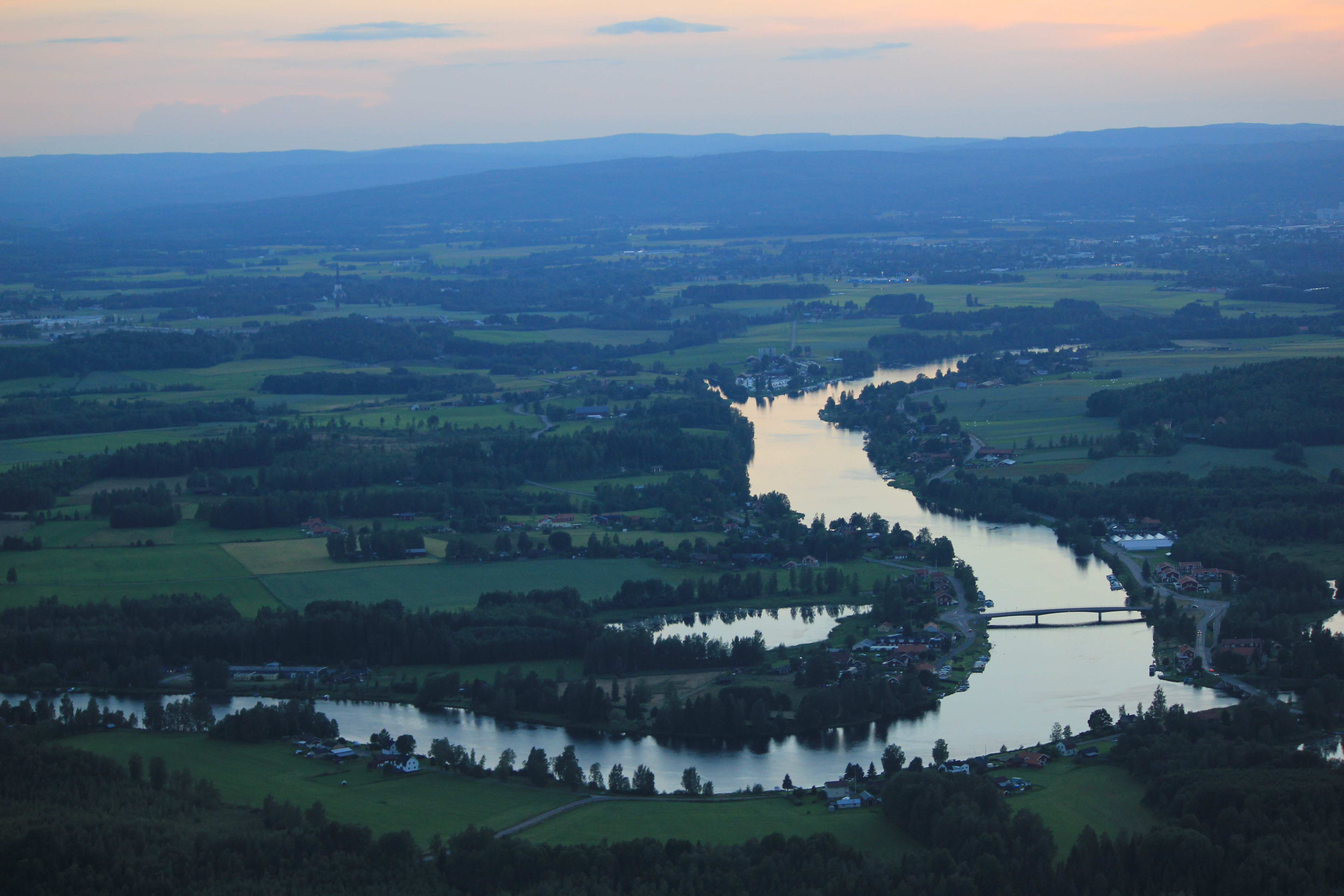 Flygfoto över Borlänge kommun, Dalarnas län, Sverige. This aerial photograph has been approved for publishing by the Swedish Armed Forces with the ID: FMTM 10 830:11043 This tag does not indicate the copyright status of the attached work. A normal copyright tag is still required. See Commons:Licensing.